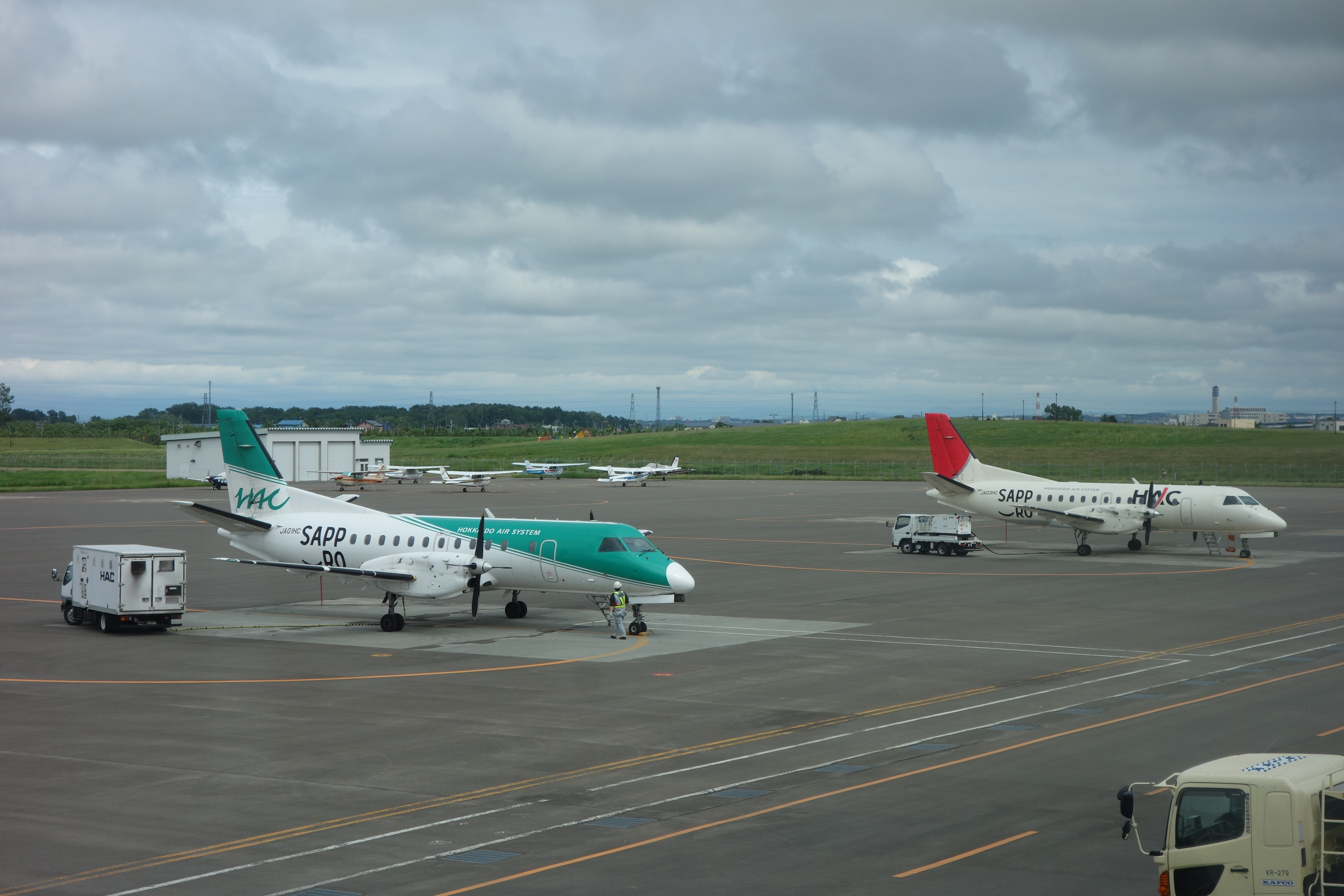 丘珠空港に駐機するHAC機（サーブ、340B-WT） 左）JA01HC（新塗装）、右）JA03HC（旧塗装） （2013年6月20日）